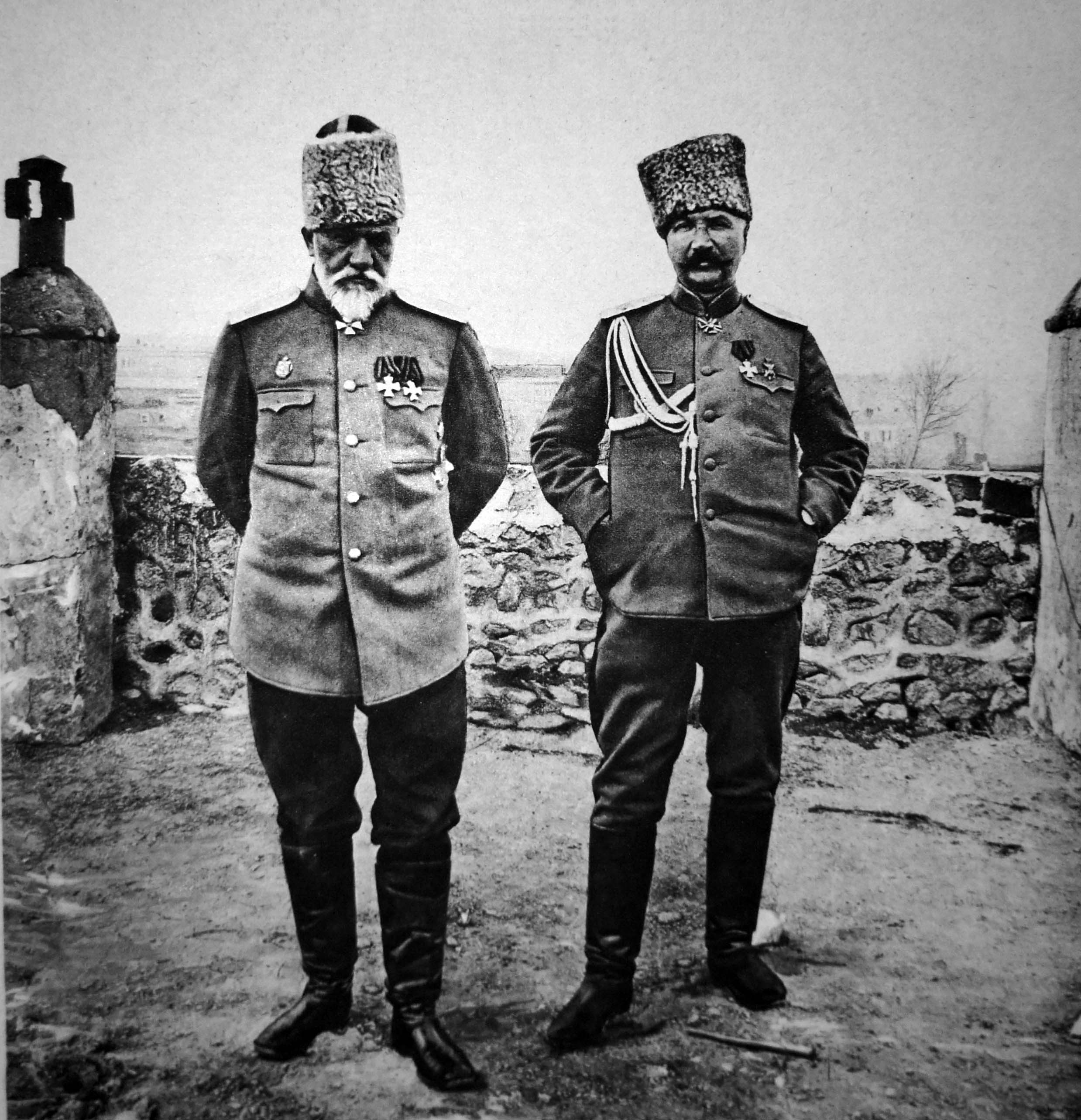 Le Miroir N°_129_la généraux russe Pierre Pietrovitch Kalitine_commandant du corps d'armé du Caucase et Lastotchkine son chef d'état-major en couverture, ils prirent Erzeroum.